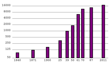 Datenquelle: Canvas-Source (pd)